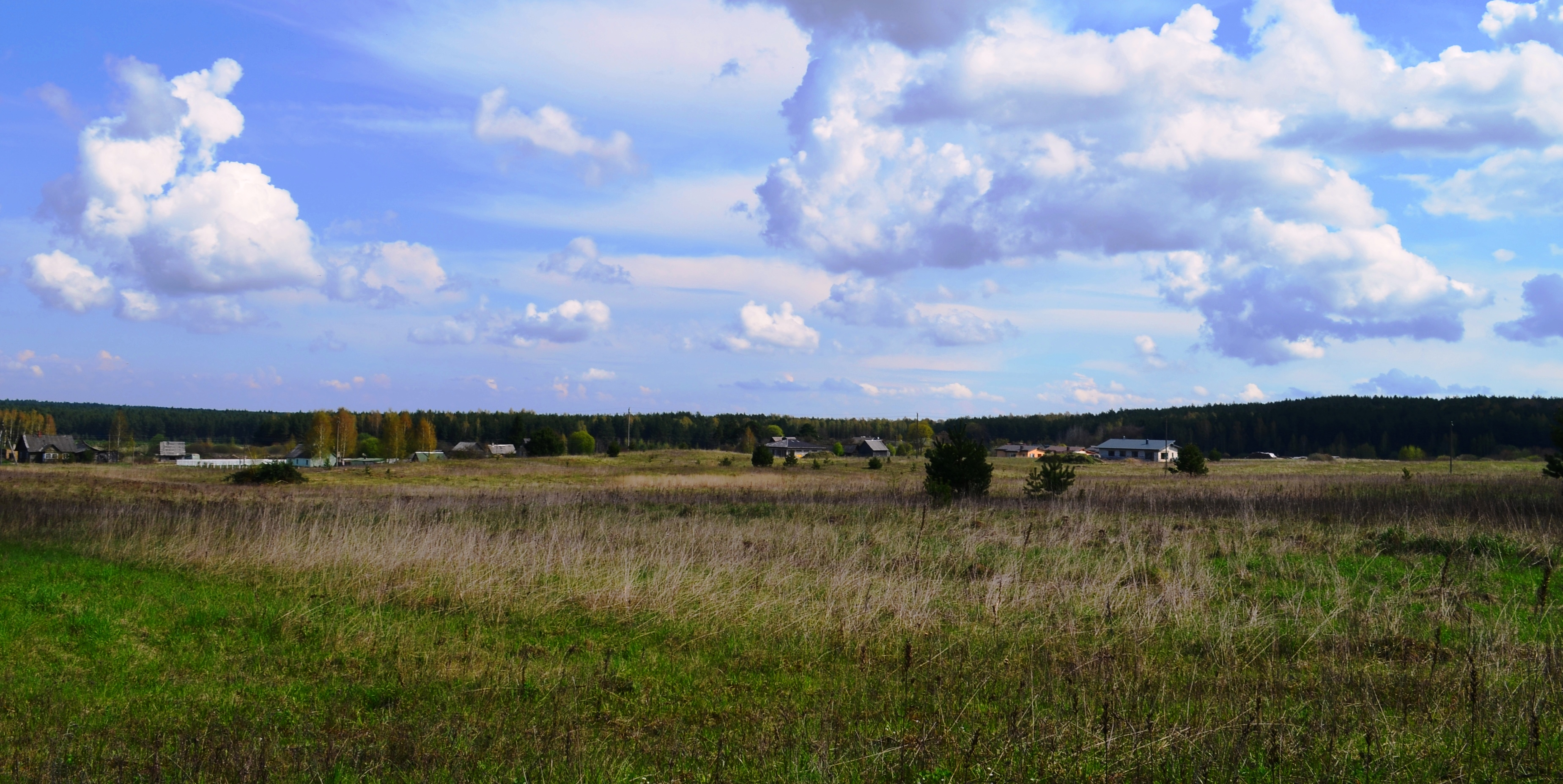 Gailiūnai, Vilniaus raj.